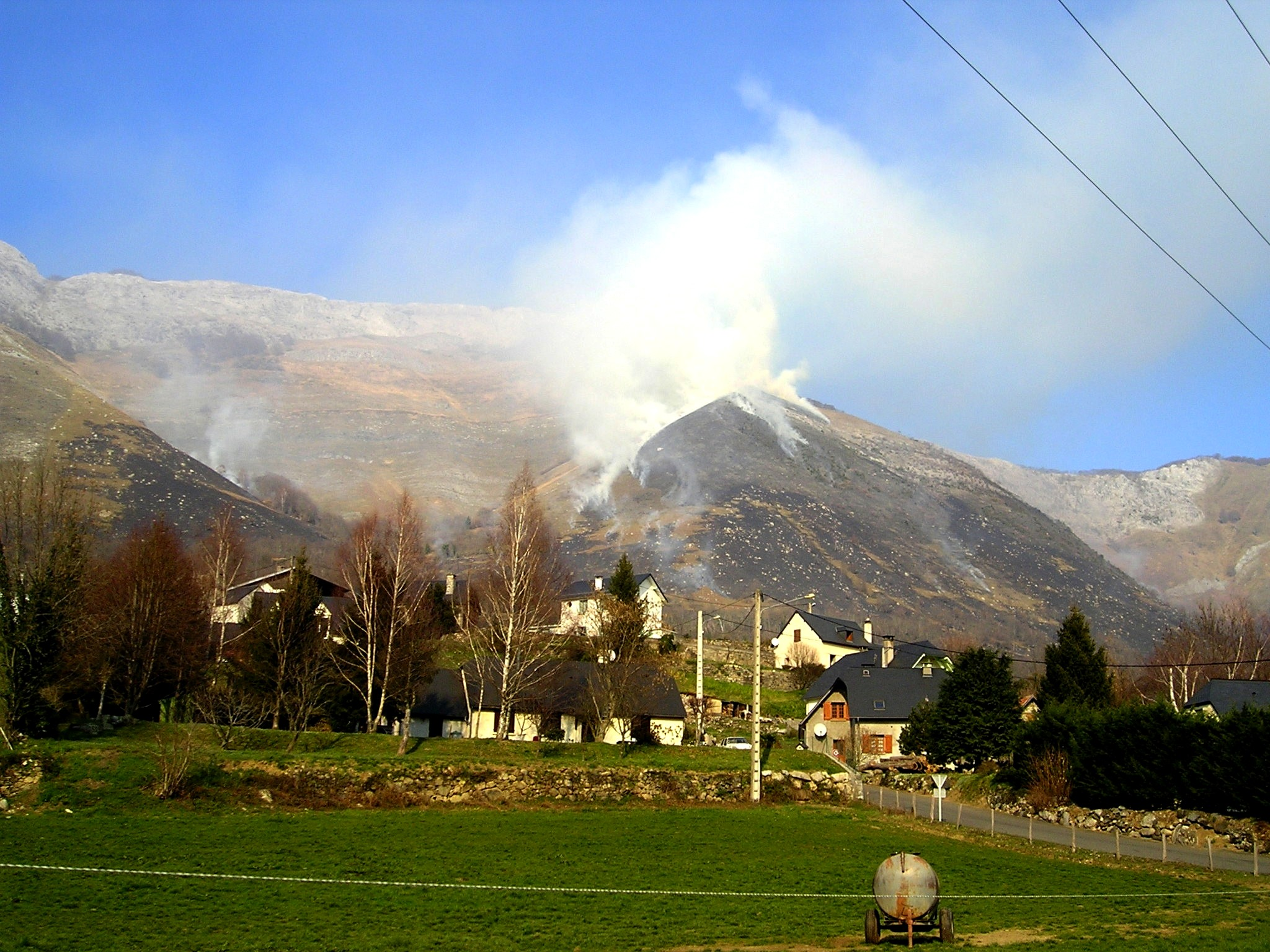 Ecobuage, Hautes-Pyrénées